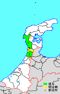 Ishikawa Hakui-gun